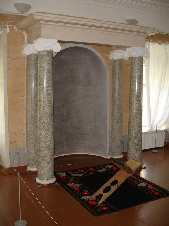 Михраб Ханской мечети в г. Касимов, Рязанская область, Россия